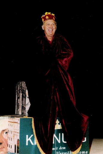 Das Foto Zeigt den Kabarettisten Gert Kießling, in der Produktion "Kaiser König Bertelsmann". Offizielles Produktionsfoto des Kabaretts Distel